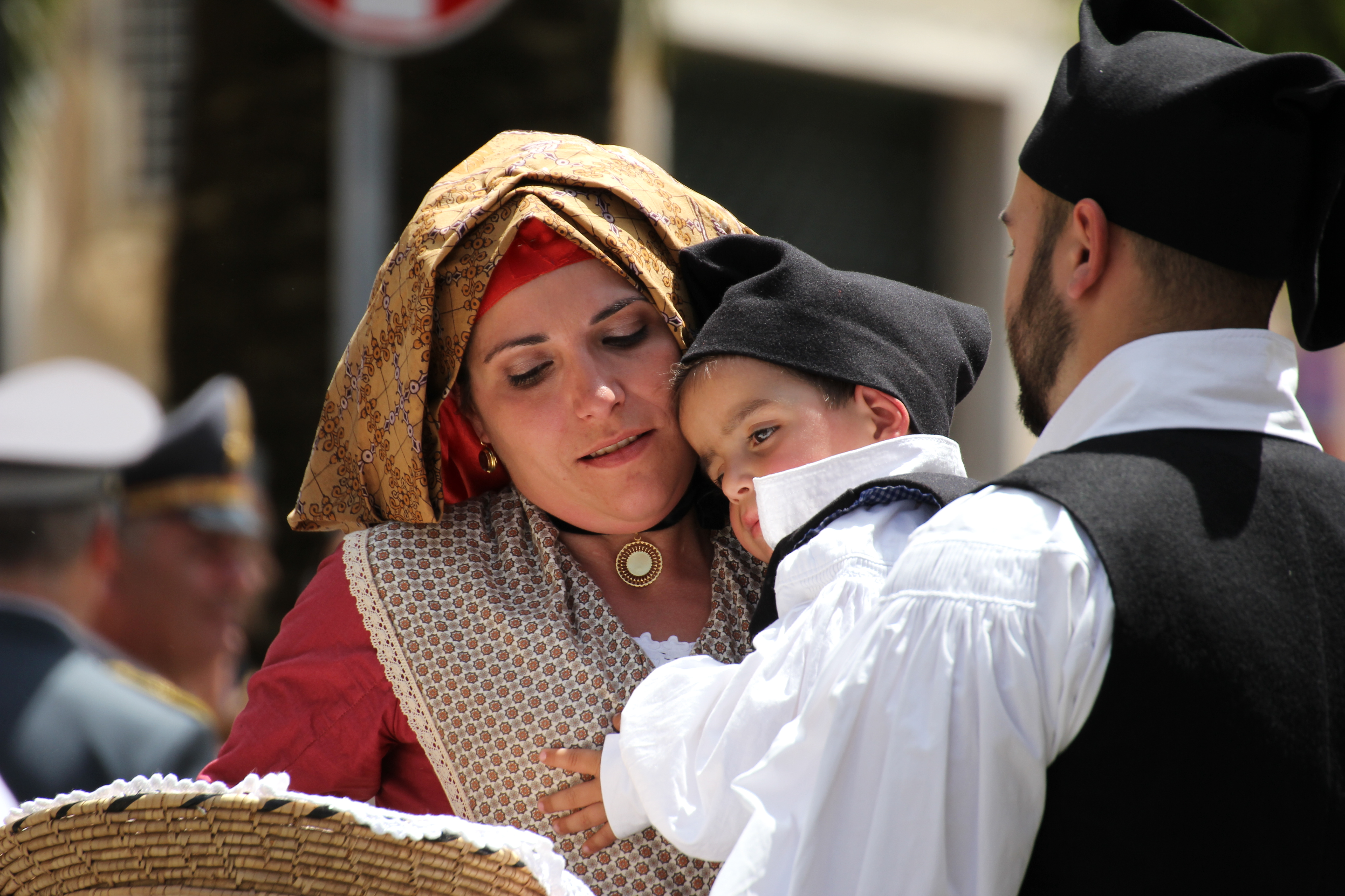 Costume tradizionale